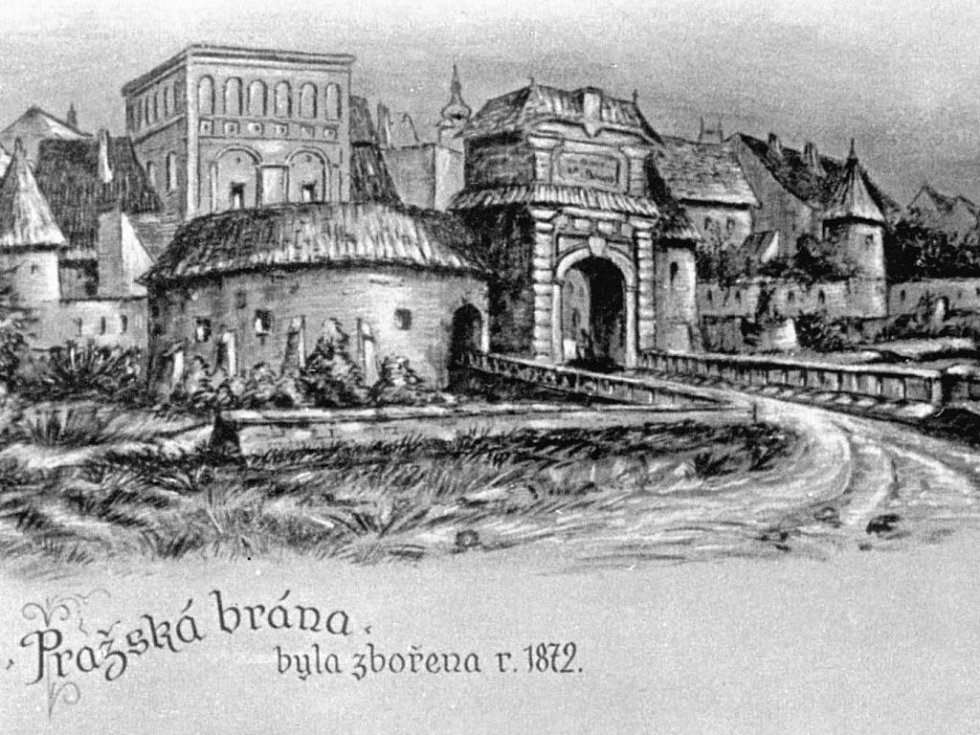 Pražská brána s barbakánem, kopie historické kresby, chybný rok zboření.